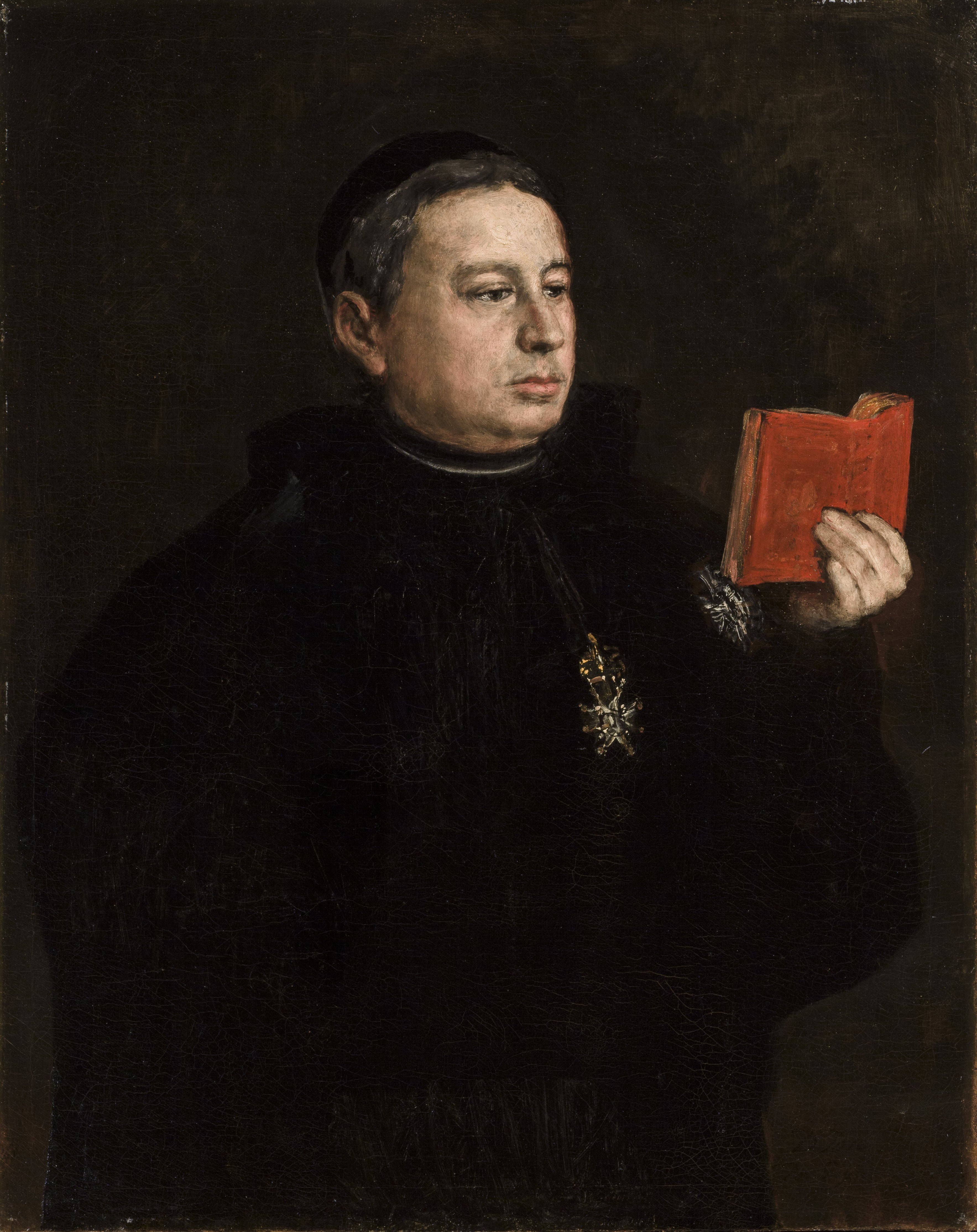 Retrato del canónigo y doctor español José Duaso y Latre (1775-1849), que fue capellán de honor del rey, juez de la Real Capilla y caballero de la Orden de Carlos III.